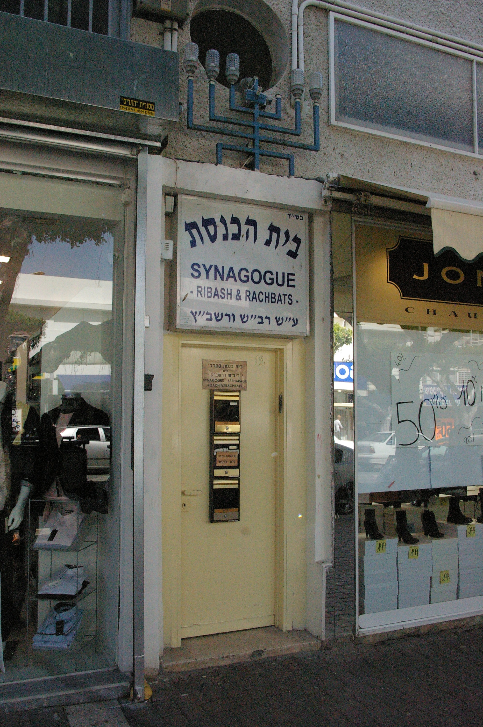 Une discrète synagogue séfarade à Netanya